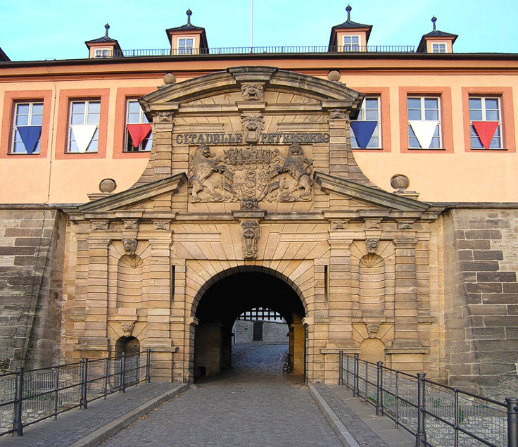 Peterstor (errichtet zwischen 1666 und 1668) mit Amtswappen von Johann Philipp von Schönborn, Haupttor der Zitadelle Petersberg in Erfurt